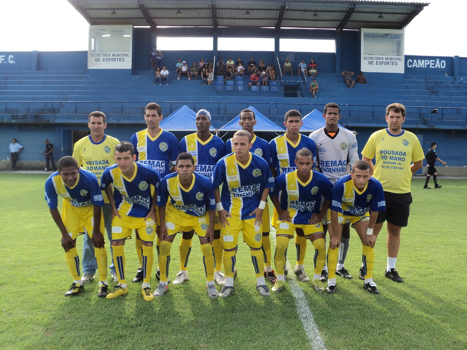 Equipe profissional do Carapebus perfilada.